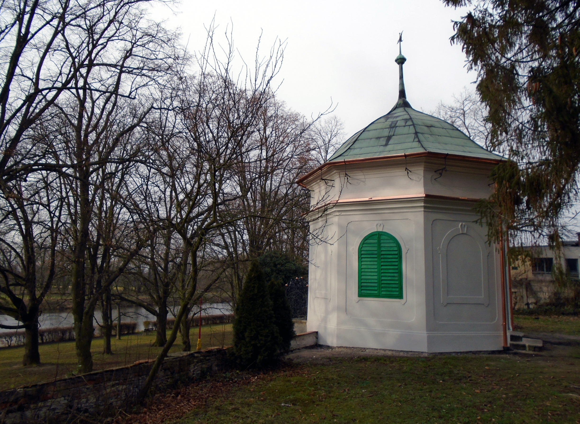 Gloriet po rekonstrukci.